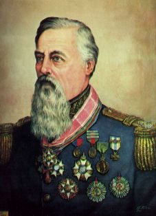 Marechal Emílio Luiz Mallet, Barão de Itapevi